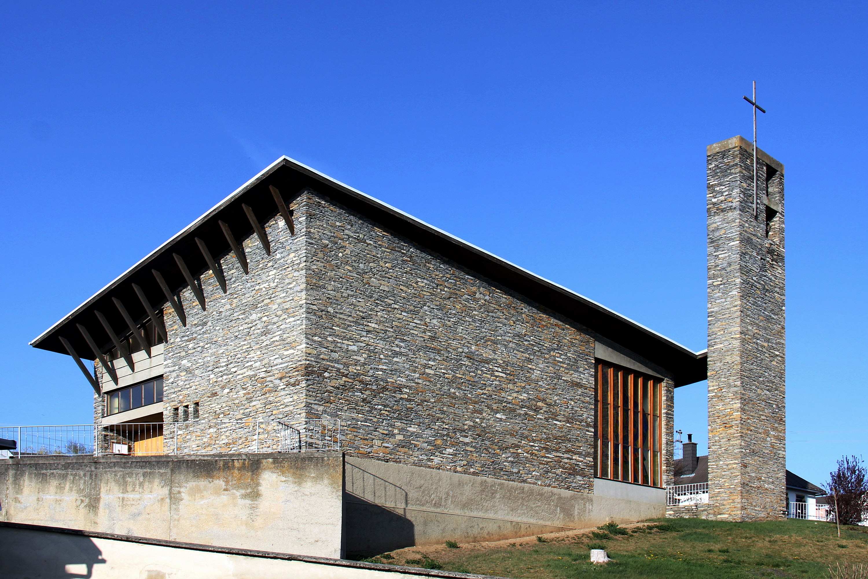 Markt Neuhodis - Katholische Filialkirche Zur Kreuzauffindung in Althodis Object location47° 18′ 53.74″ N, 16° 22′ 32.33″ E